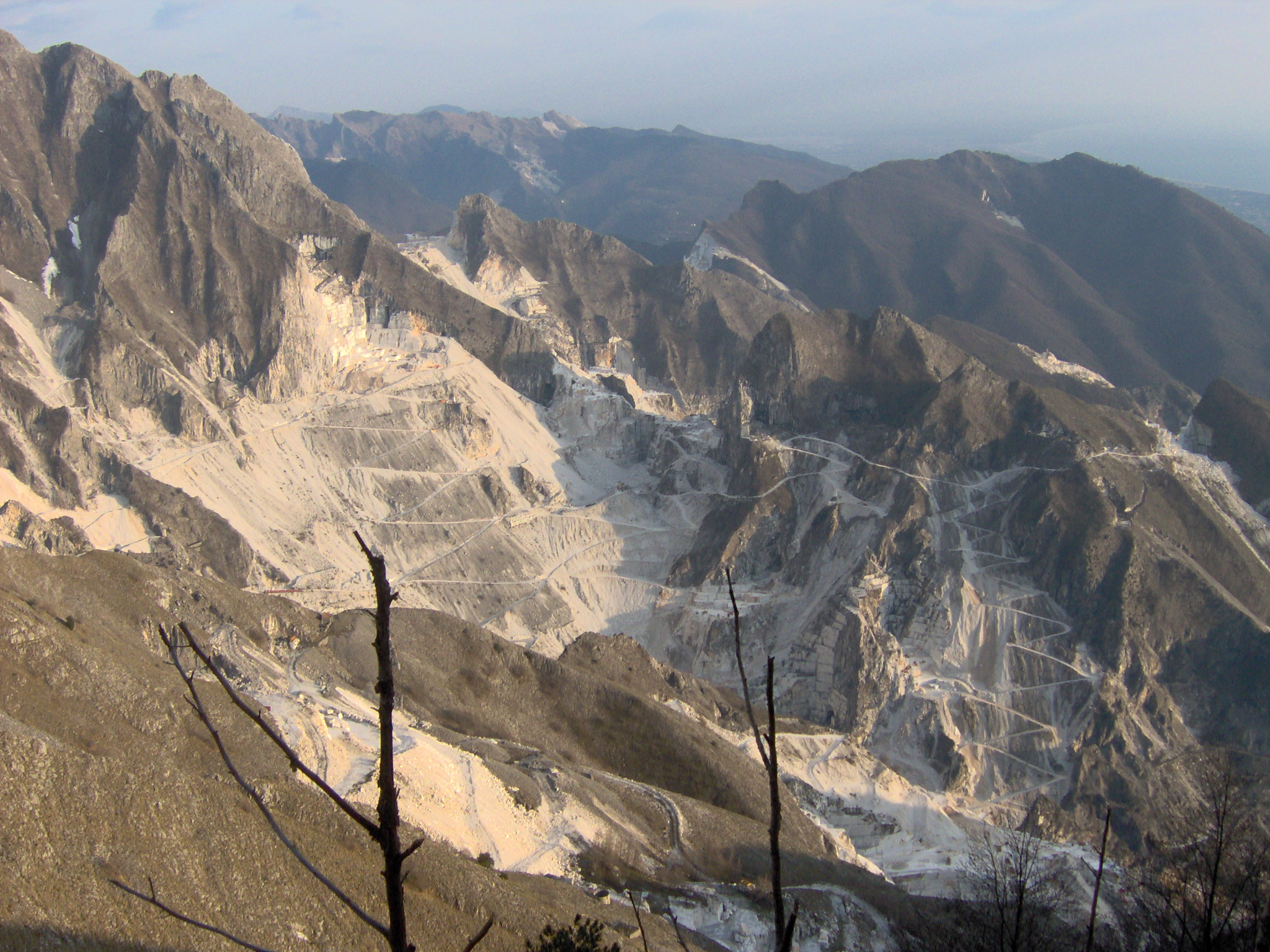 Le cave di marmo viste da Campo Cecina